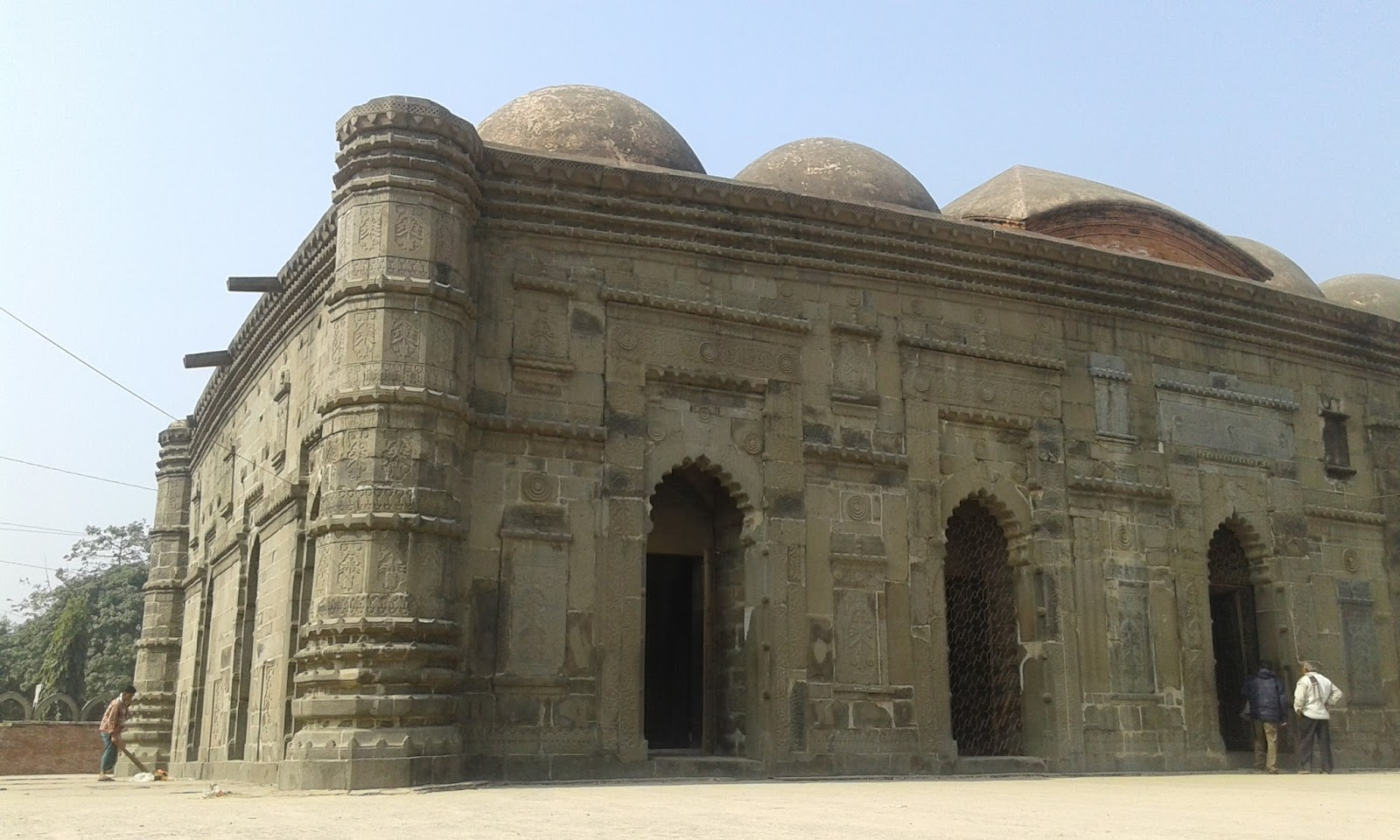 ছোট সোনা মসজিদ